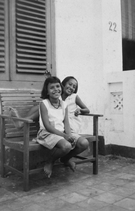 foto. Portret van twee Indo-Europese meisjes voor het pension van A. Haverkamp, Batavia